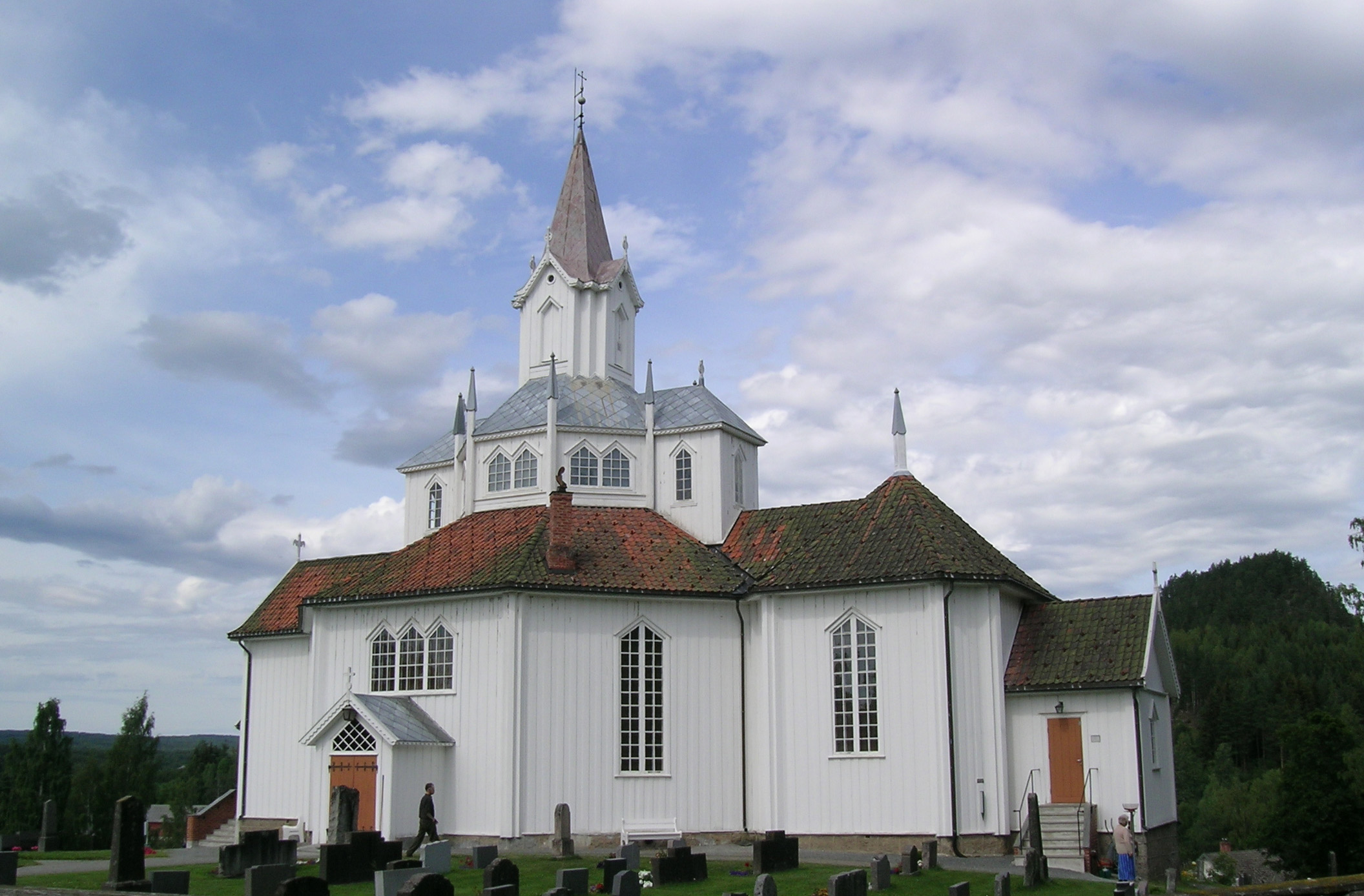 Tangen church, Stange, Hedmark, Norway.